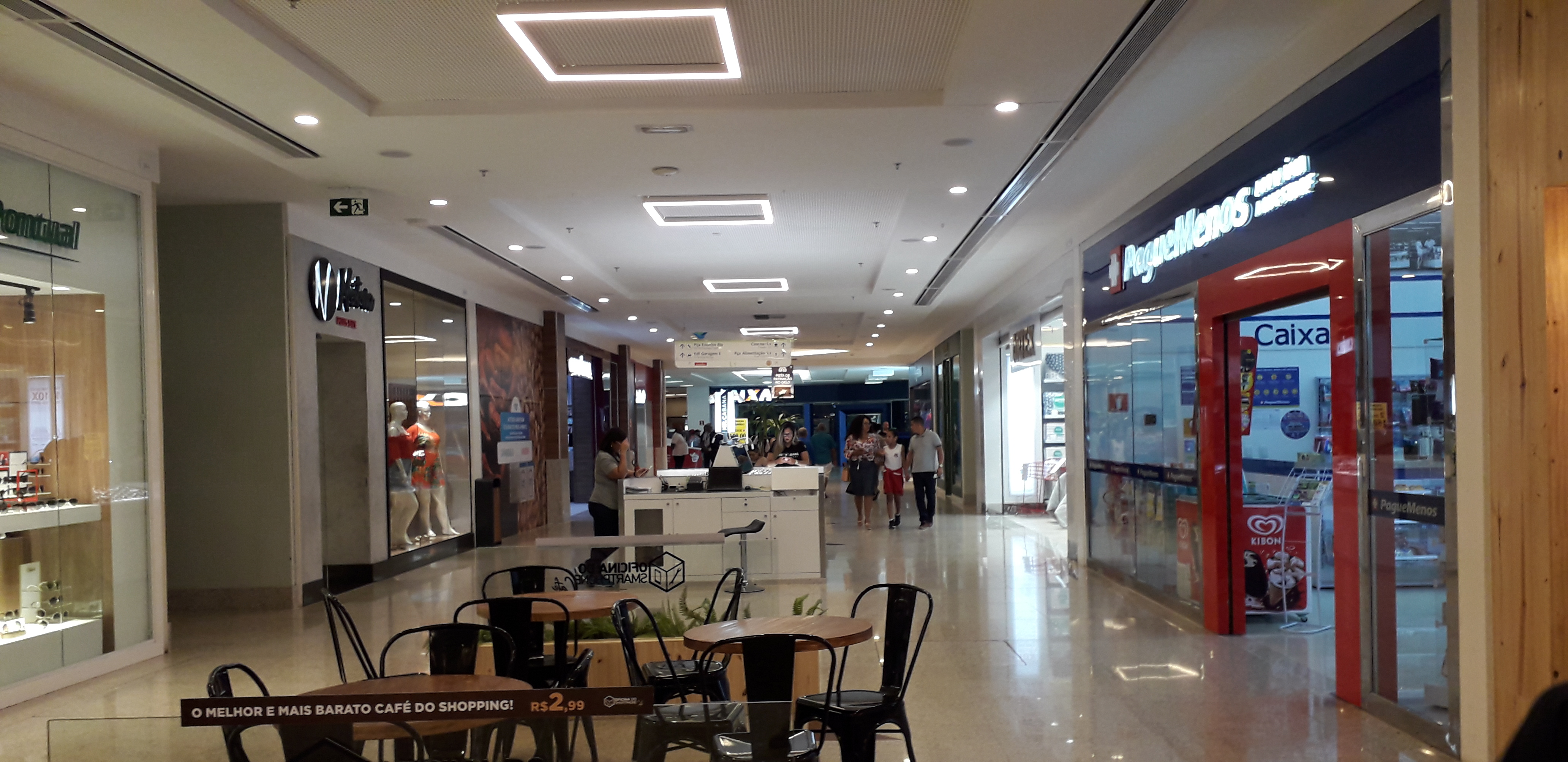 Imagens internas do Shopping RioMar Aracaju, Aracaju, Sergipe